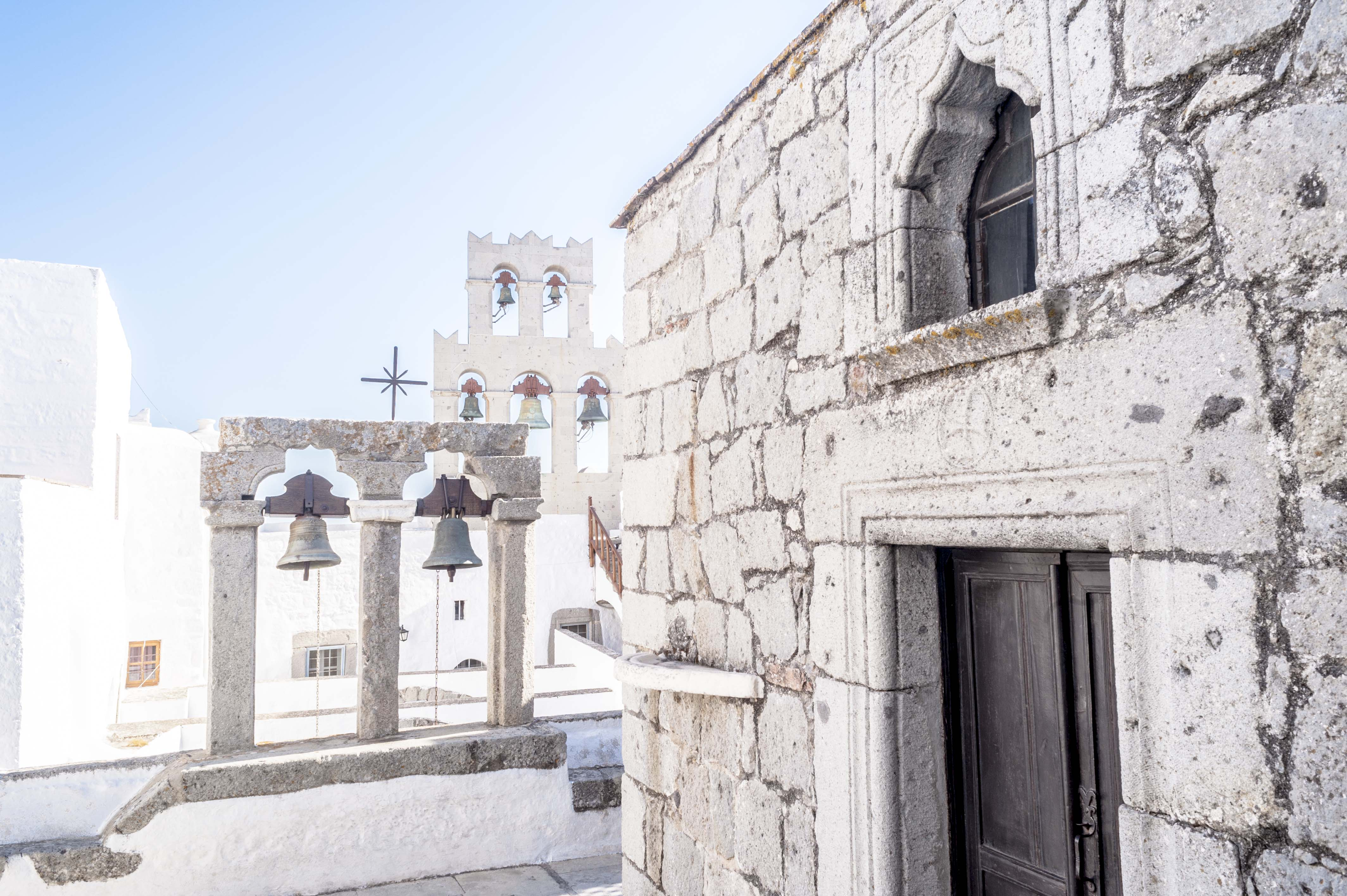 Το Μοναστήρι του Αγίου Ιωάννη του Θεολόγου στην Πάτμο εσωτερικά.